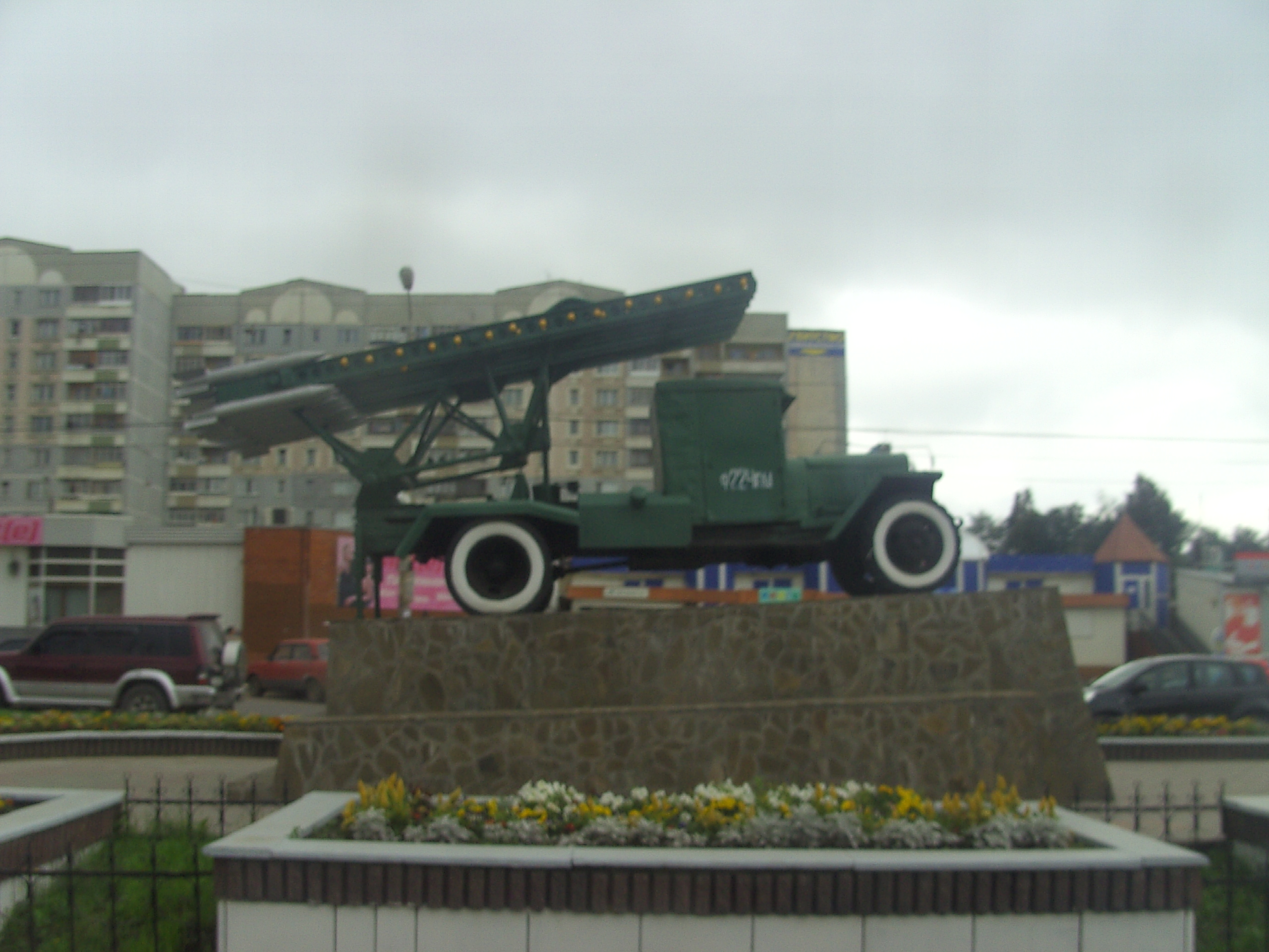 Katjuscha memorial in Tula (Russia)